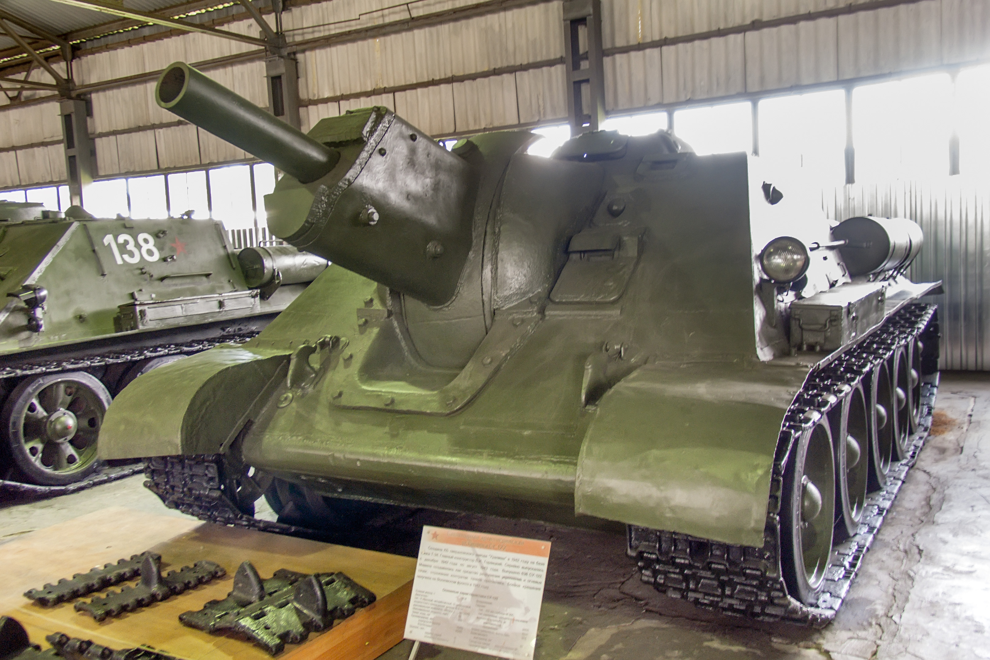 Самоходная установка СУ-122 в Центральном музее бронетанкового вооружения и техники в Кубинке.